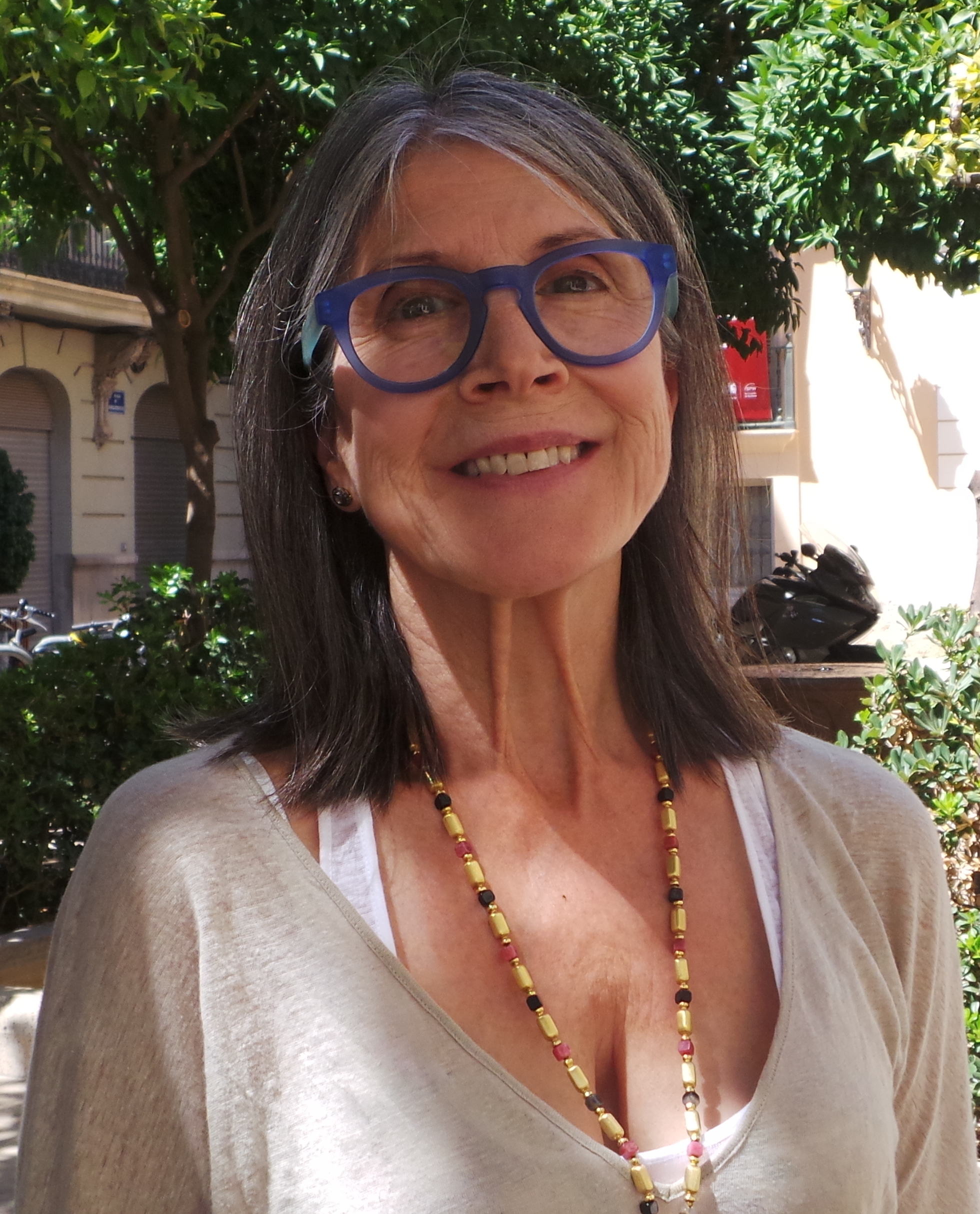 Valencia, 2017